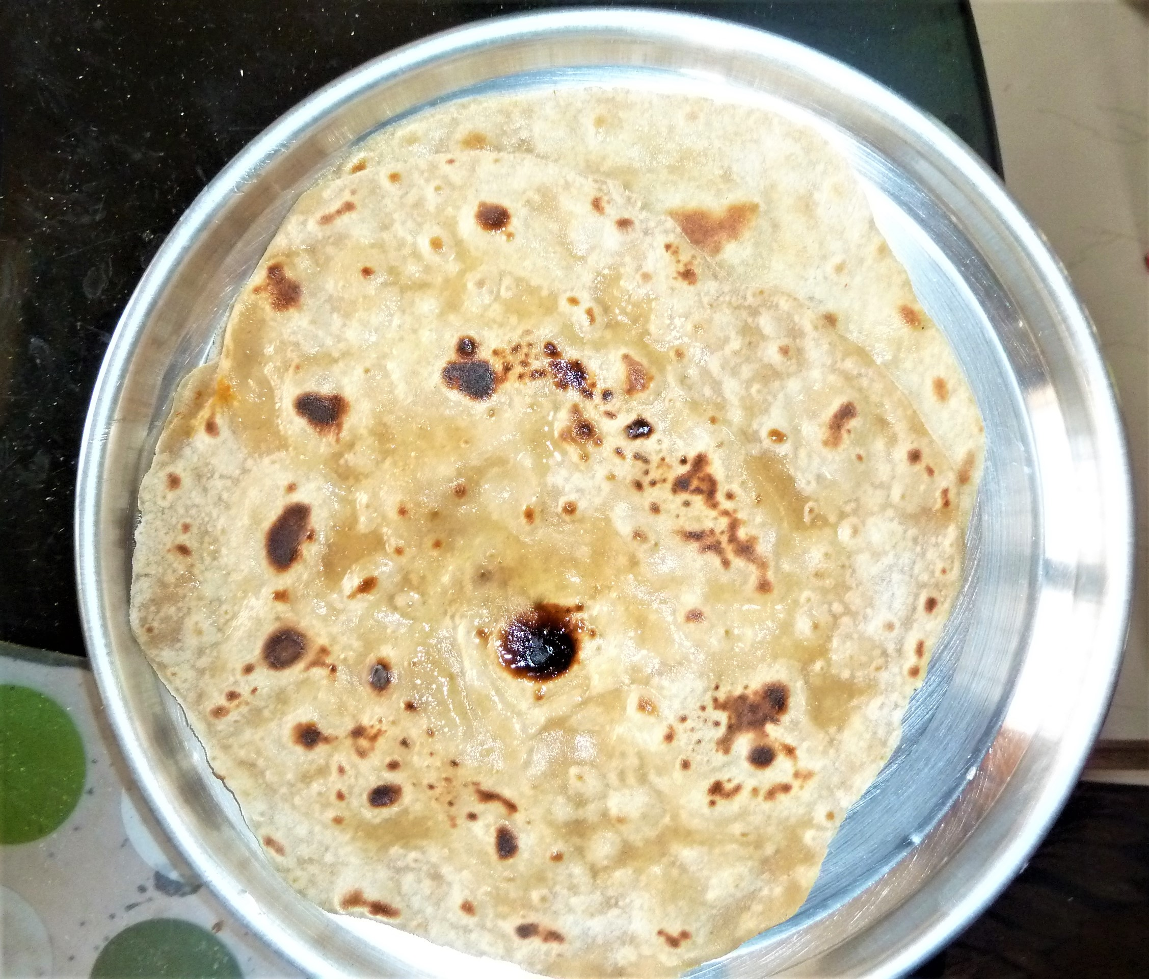 చపాతీలు